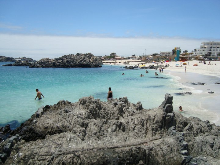 HERMOSO